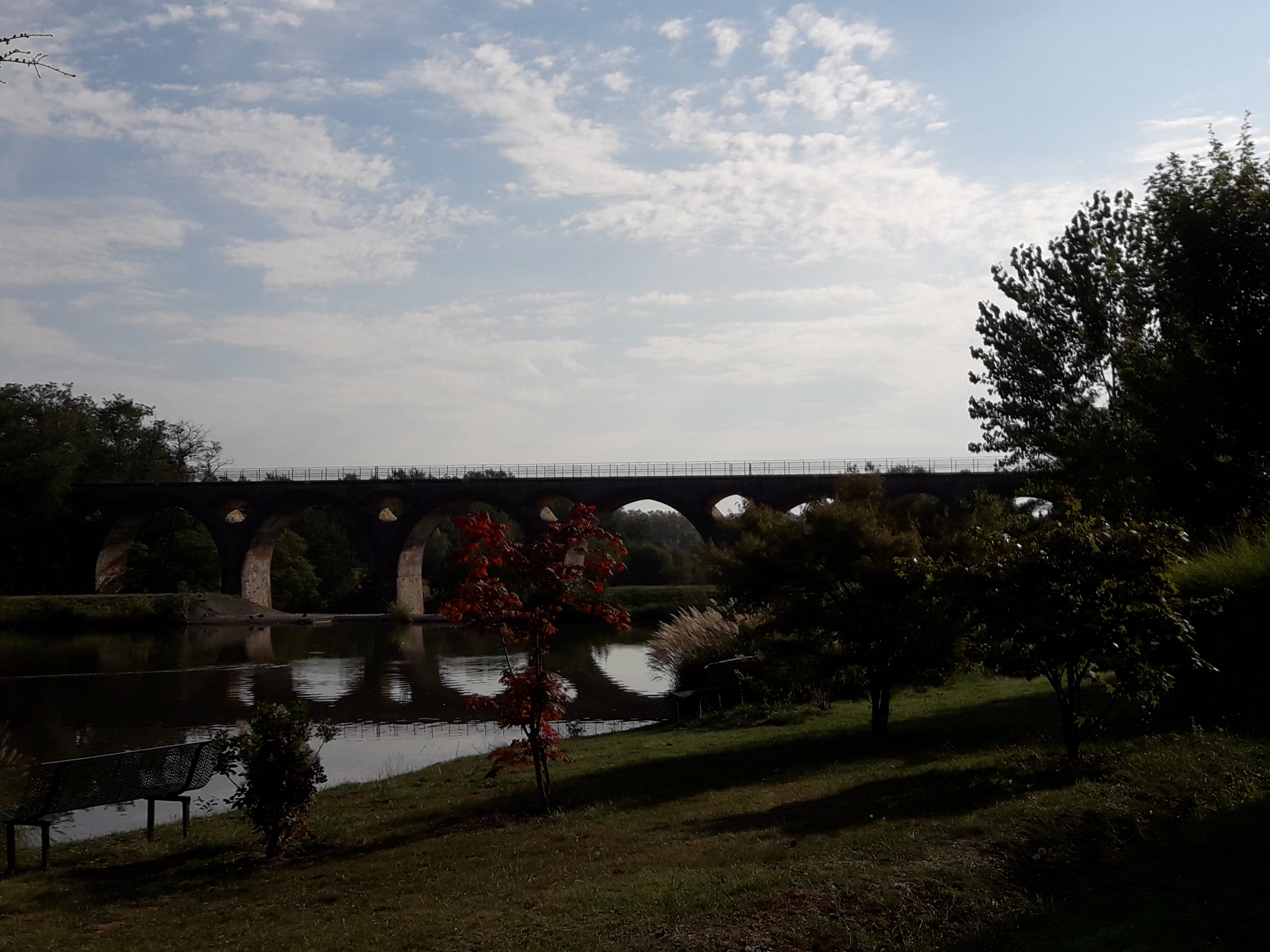 Le viaduc des Coucuts à Boulogne-sur-Gesse en 2018.